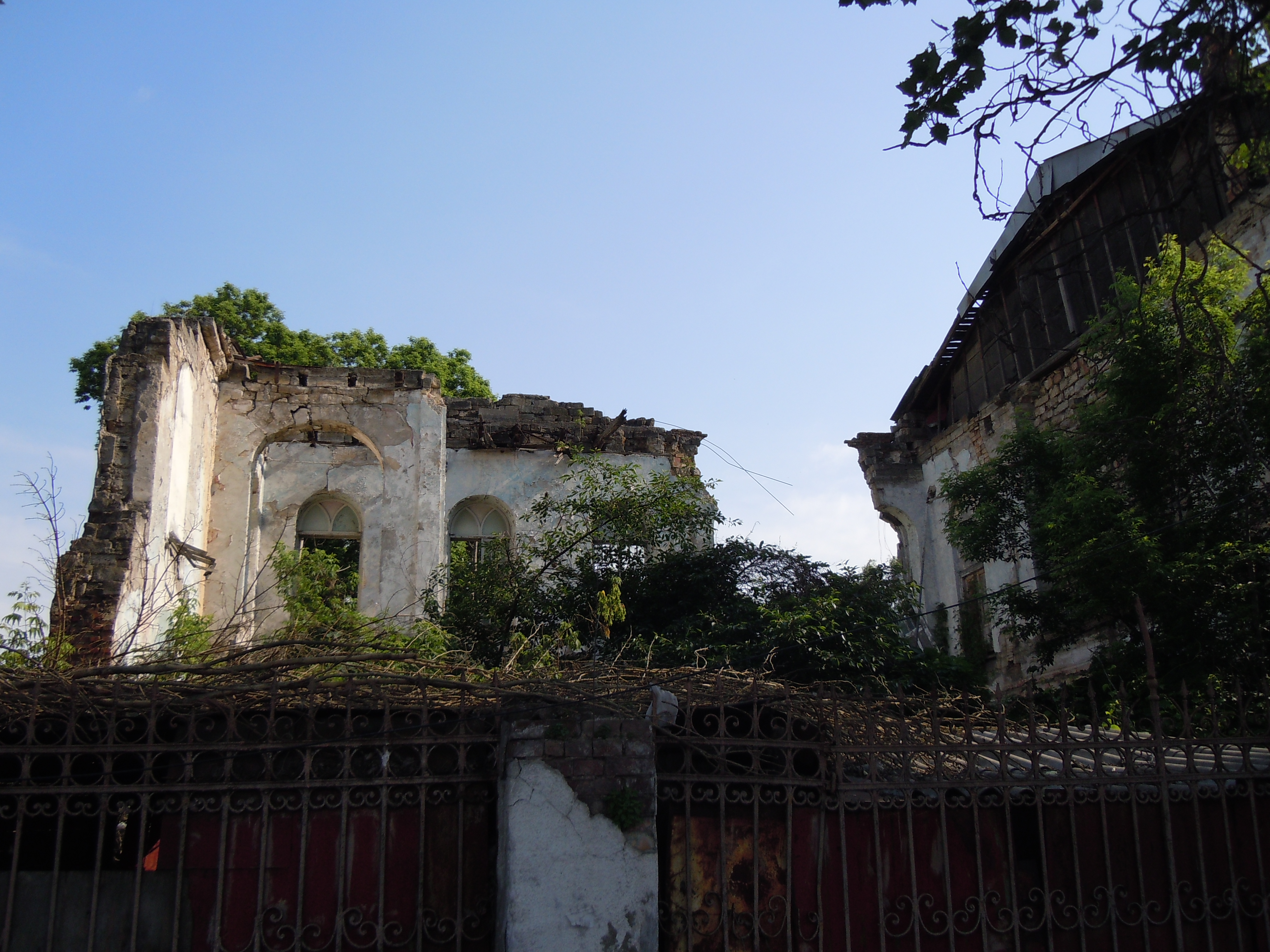 Руїни Синагоги "Нахлас Еліезер" на Пересипу, Одеса